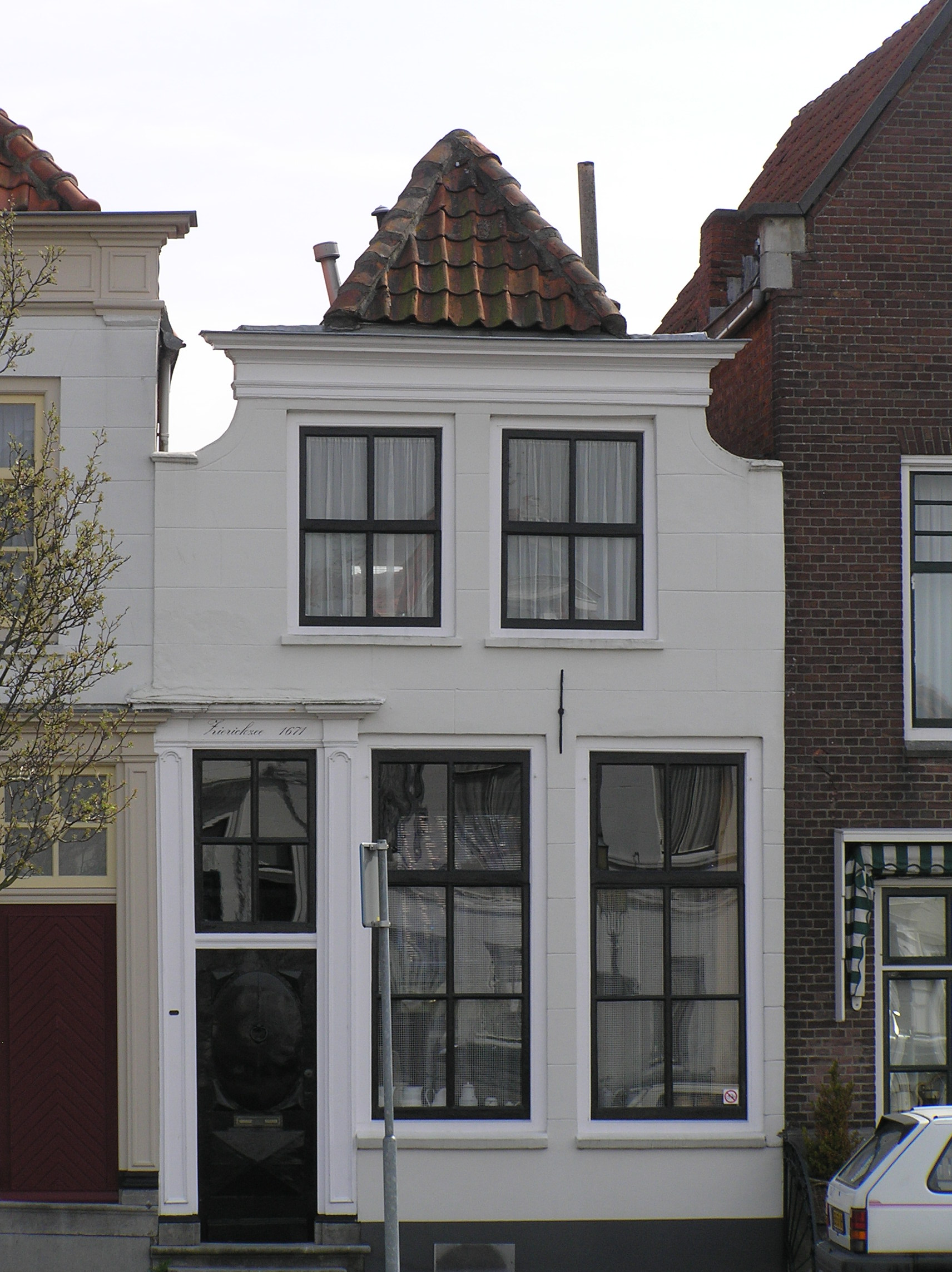 Grote Kade 12, Goes. Rijksmonument.